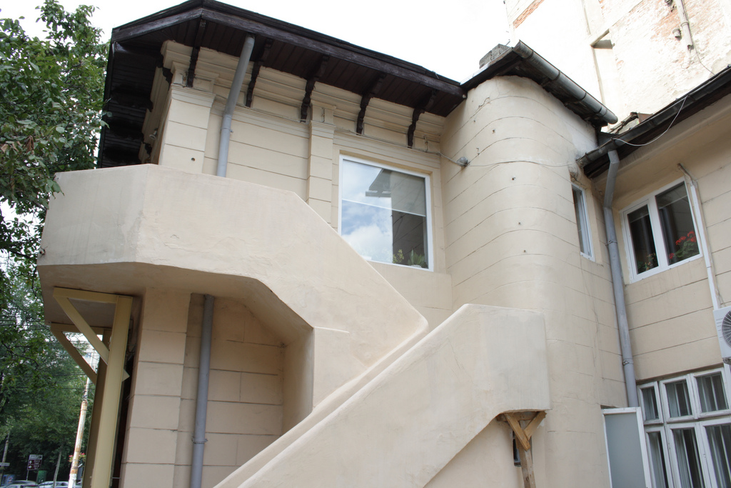 Casă, curte interioară Str. Alexandrescu Grigore 10 sector 1 presupunere pentru că numarul 10 şi numărul 12 lipsesc în curte la numărul 6 mai este o clădire, care ar putea să fie realul număr 8 si atunci acest numar 8 sa fie numarul 10? ceva elemente pot fi intrezarite in IMG_7621 ramane lipsa numarul 12 care ar putea fi a doua intrare a unei case de pe Lascar Catargiu